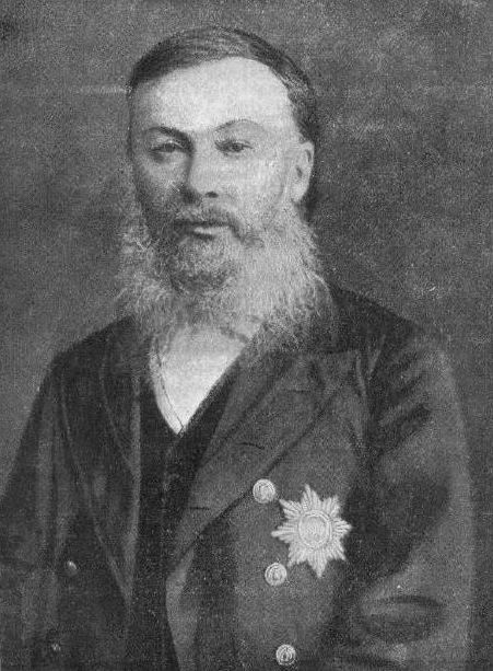 Ильминский, Николай Иванович (1822 — 1891/1892) — русский востоковед, педагог-миссионер, библеист, член-корреспондент Академии Наук.